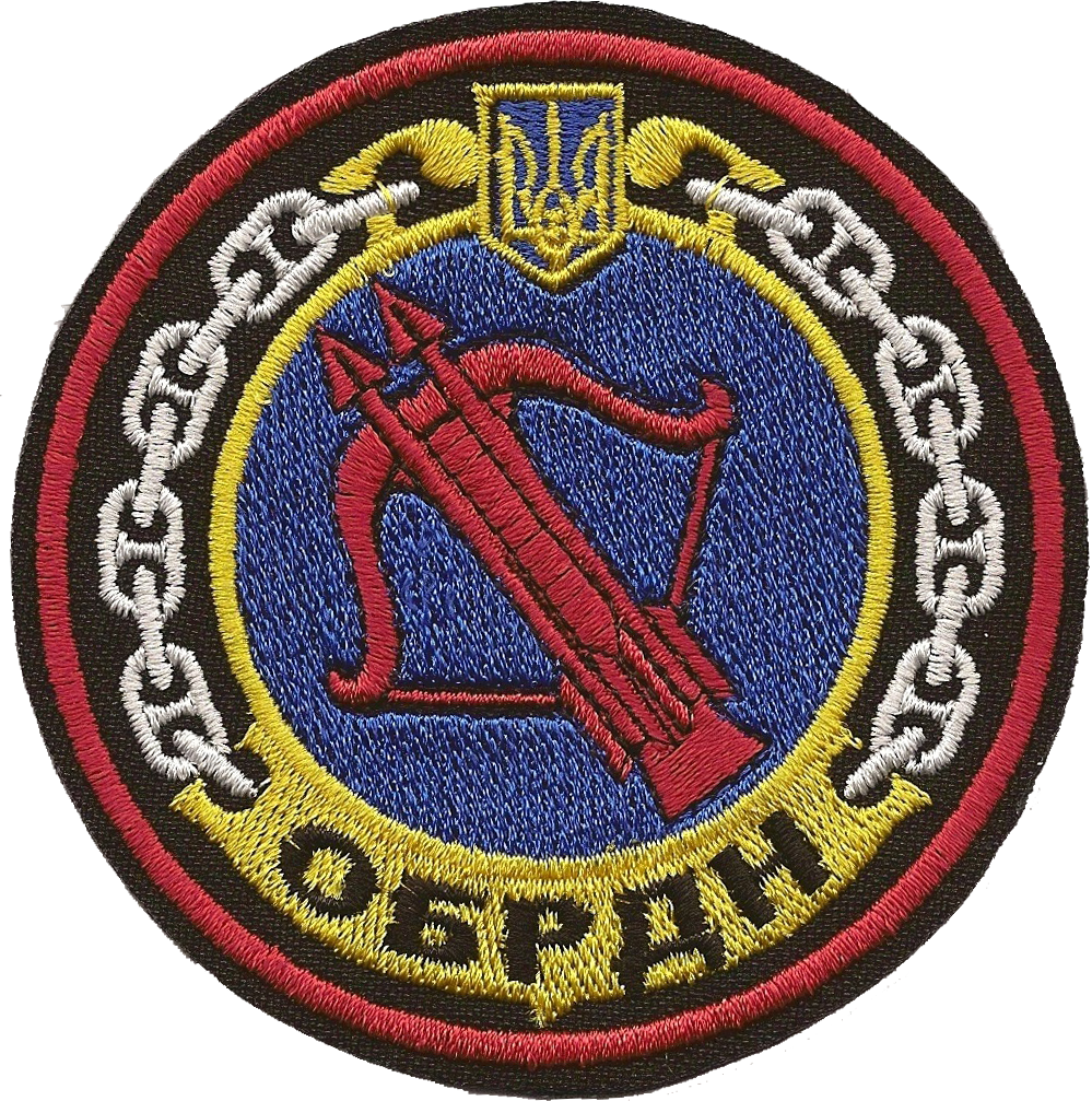 85 окремий береговий ракетний дивізіон (А2290)